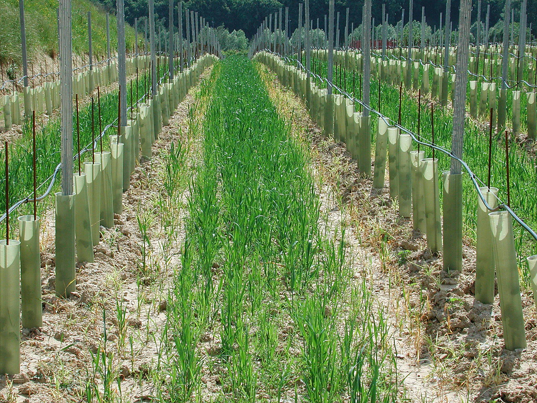 Junger Weingarten mit Fahrgassenbegrünung